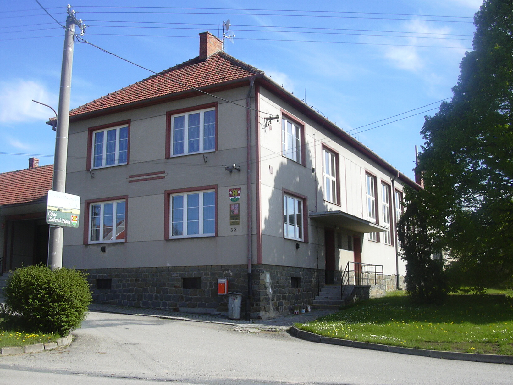 obecní úřad Zelená Hora (Vyškov- Czech republic)